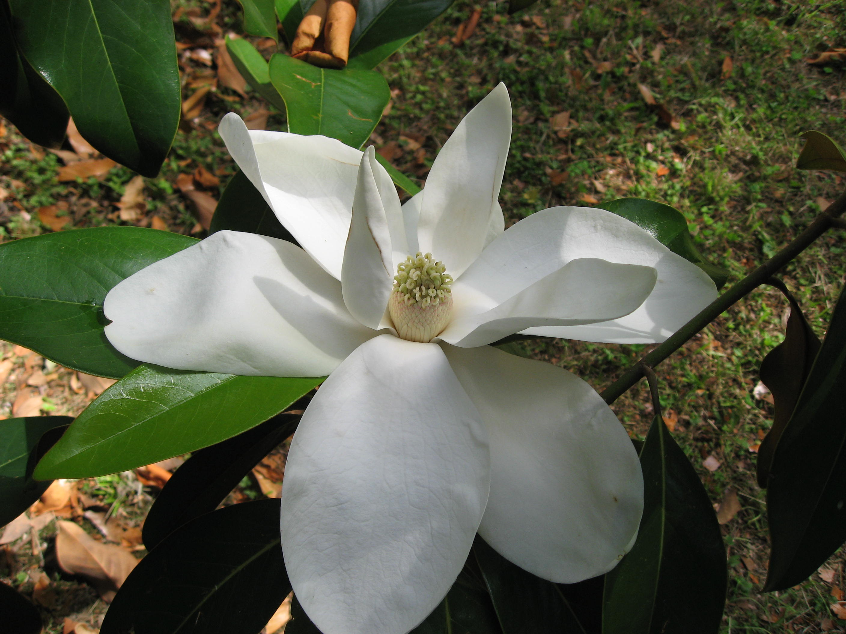 Magnolia grandiflora flower in Giardino dei Semplici di Firenze Map: 43° 46' 45" N 11° 15' 39" E